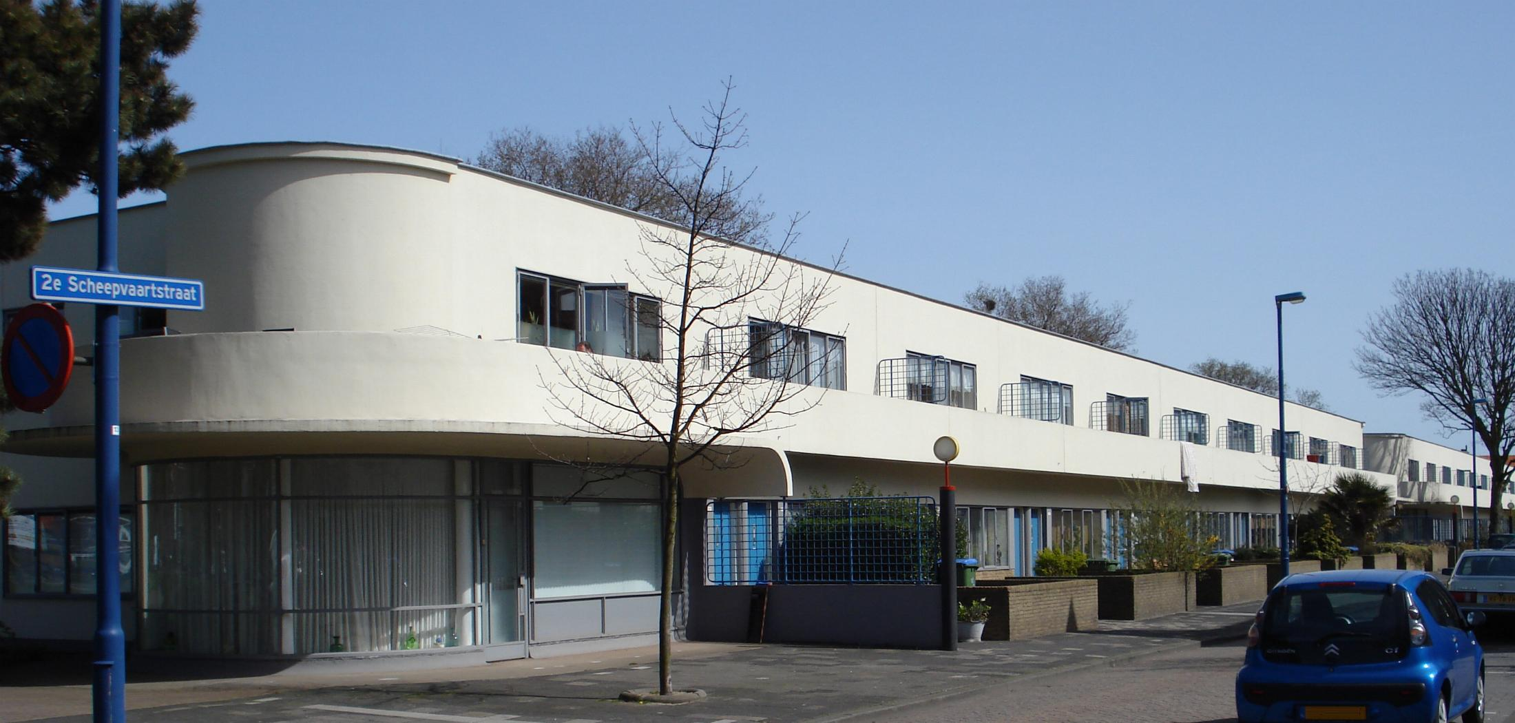 Hoek van Holland, 2e Scheepvaartstraat 91-133. Rijksmonument.